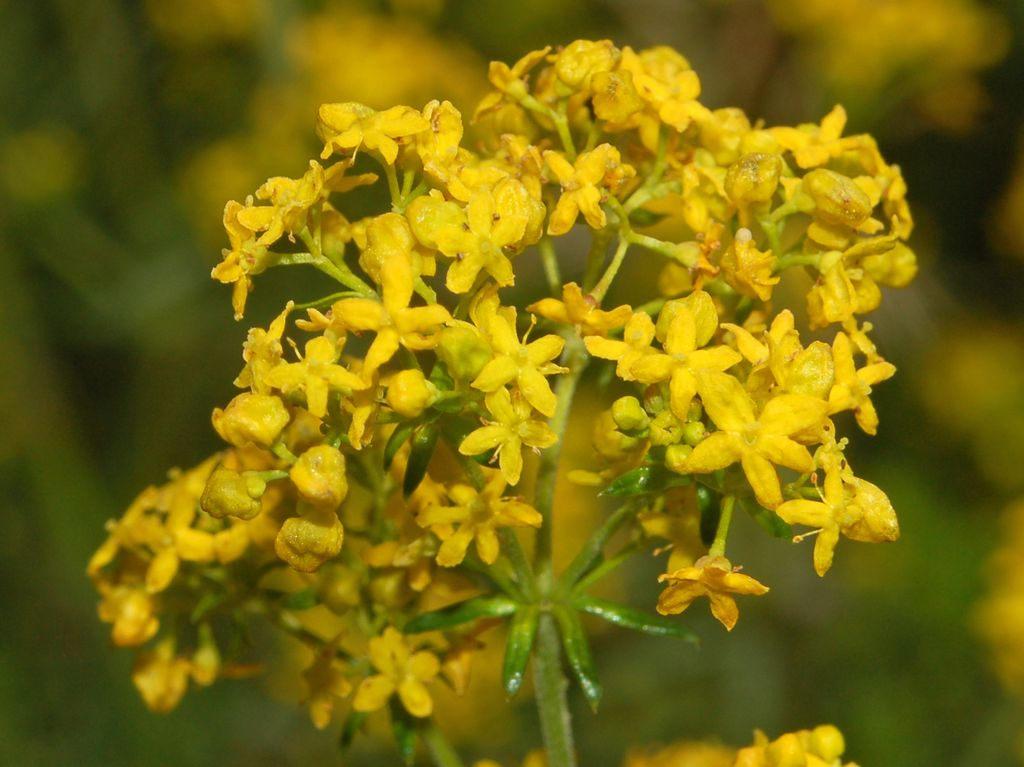 Rubiaceae - Galium verum